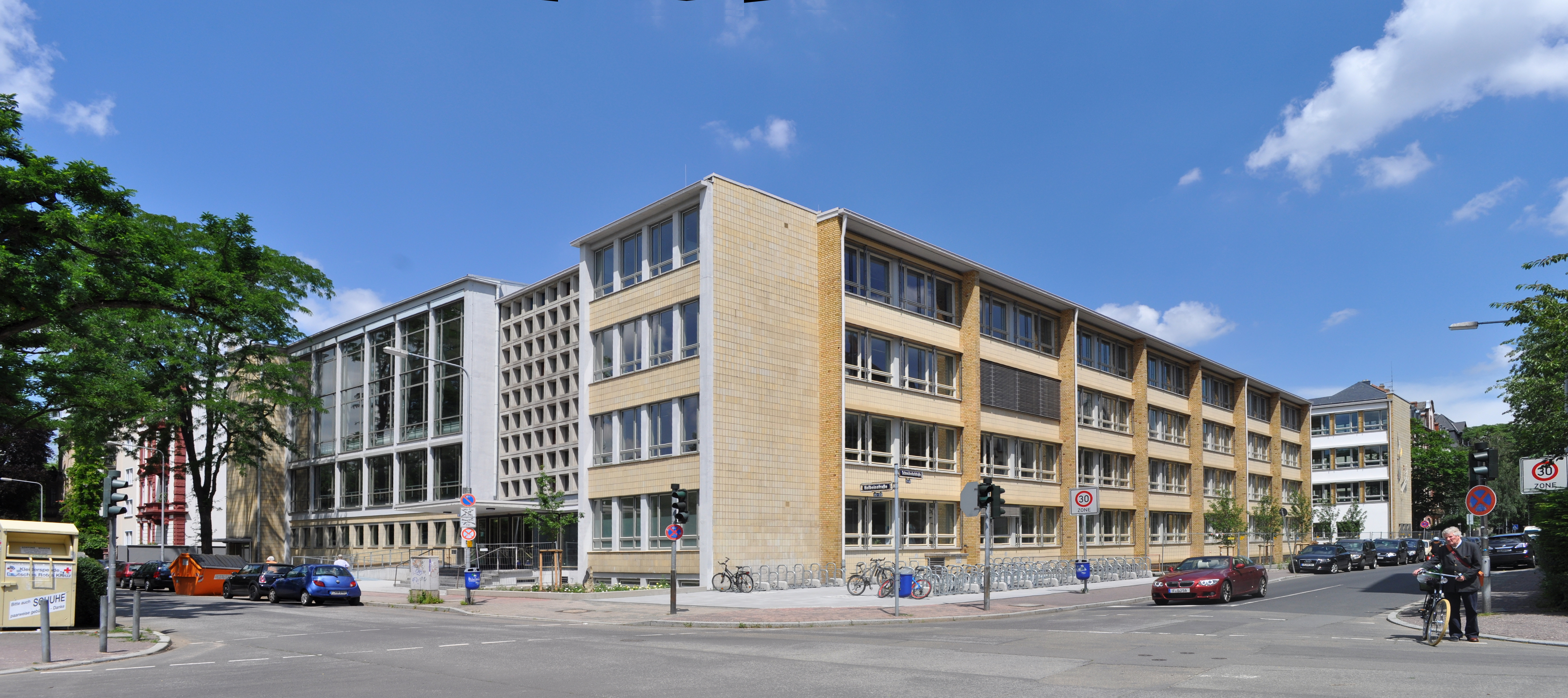 Frankfurt, Carl-Schurz-Schule